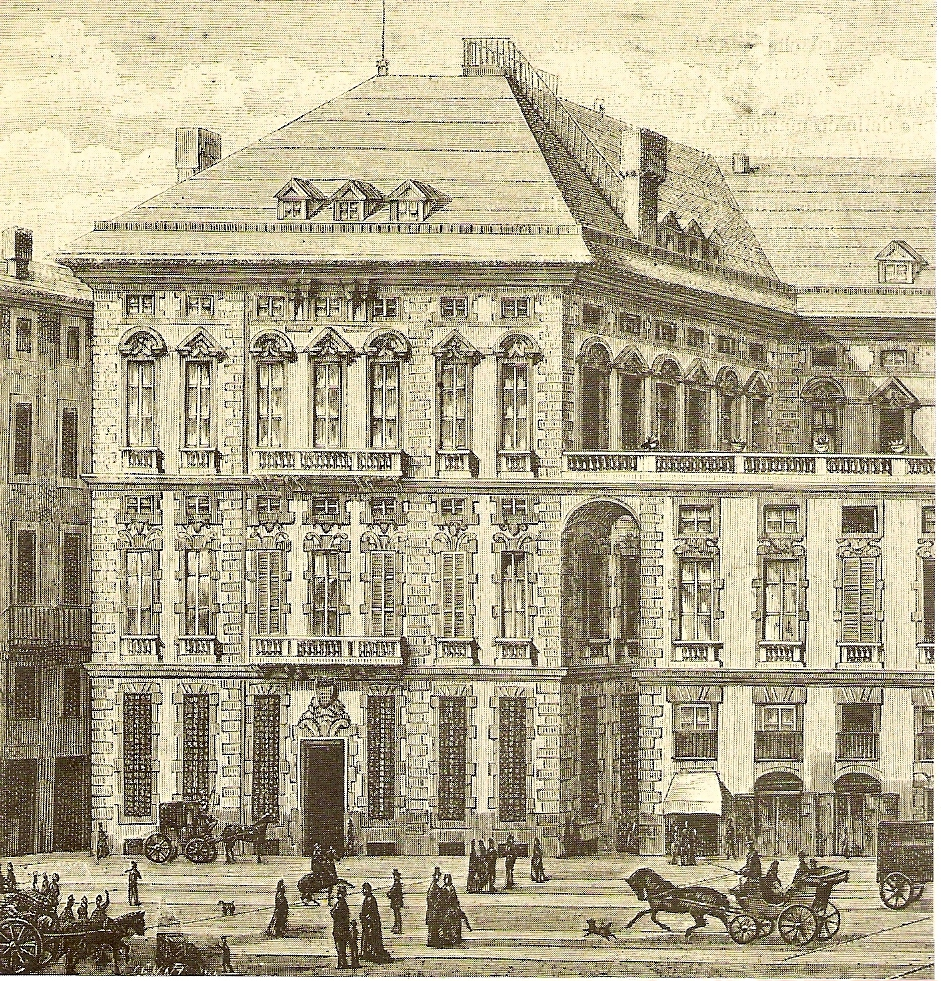 Raffigurazione del XIX secolo di Palazzo Rosso a Genova